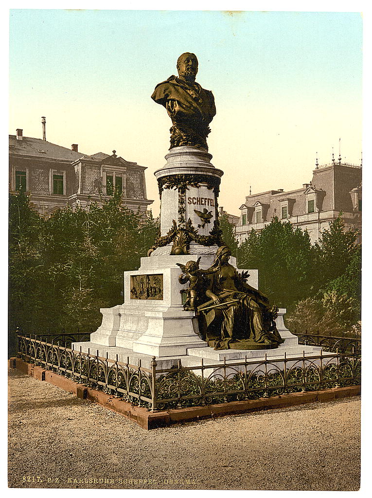 Scheffel-Denkmal am Scheffelplatz in Karlsruhe um 1900. Geschaffen 1892 von Hermann Volz. Die Verzierungen aus Metall inklusive der Musenfigur wurden im Zweiten Weltkrieg eingeschmolzen, lediglich die beiden Reliefs an den Seiten wurden in den 1990er Jahren wieder hergestellt.